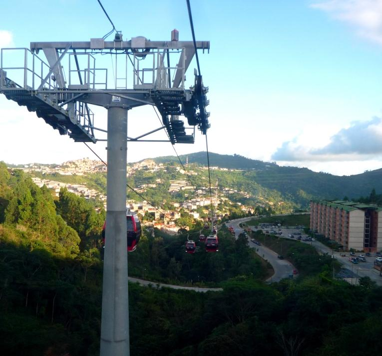 metrocable de caracas tramo mariche palo verde